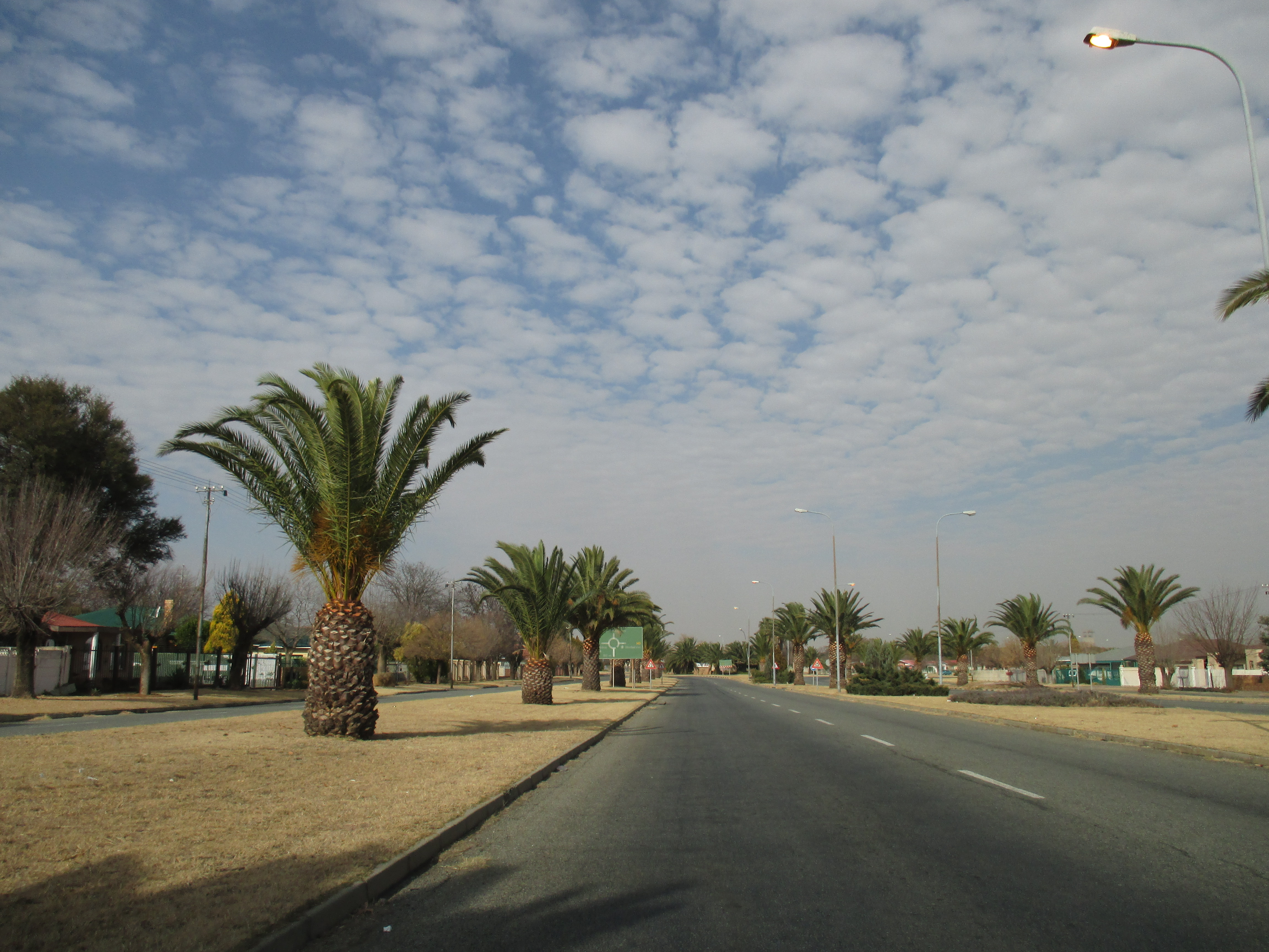 Description: Main street approaching Odendaalsrus, Free State.